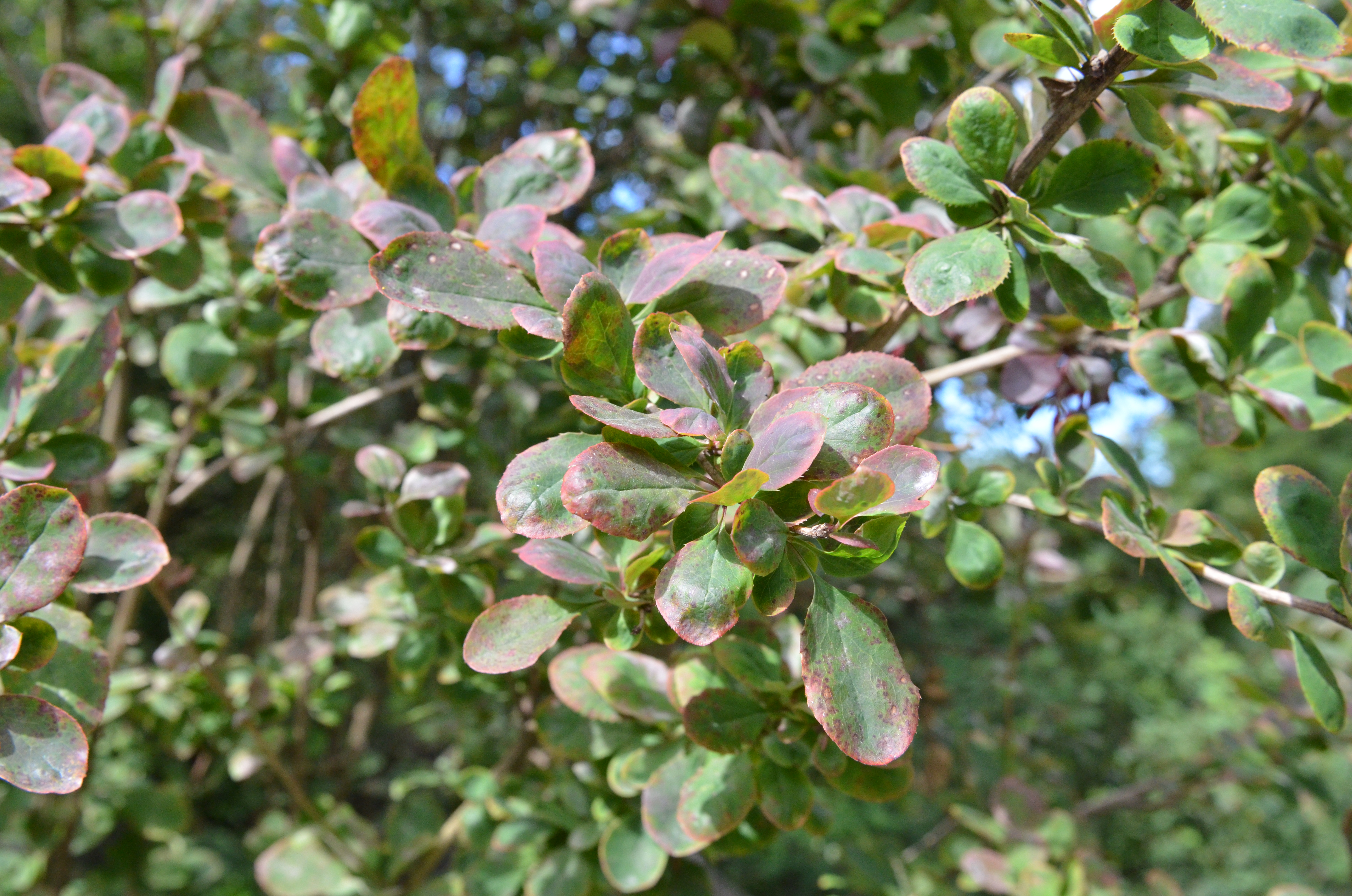 Berberis Ottawanensis i Skolparken i Jakobstad